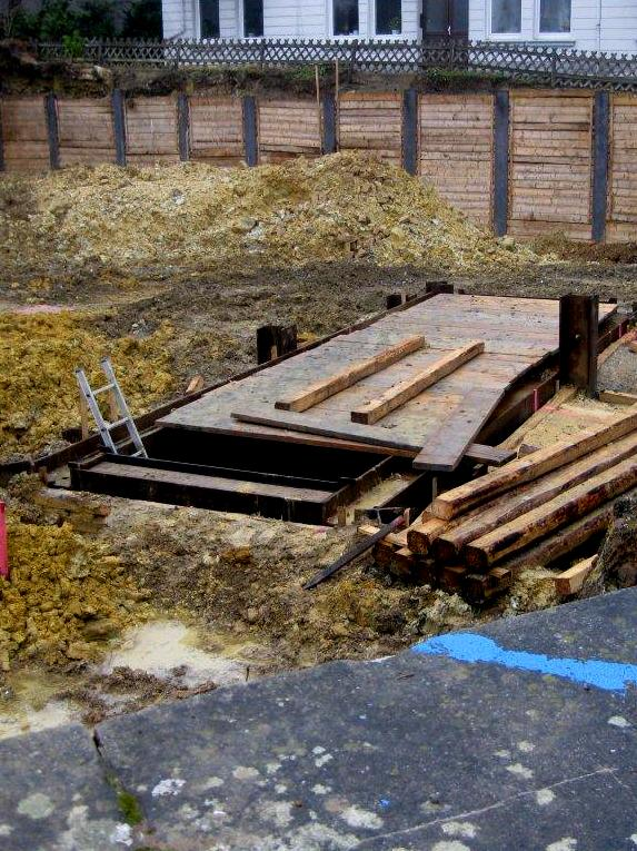 Bei Bauarbeiten freigelegter Schacht zum ehemaligen Bierkeller der Rieterberg-Restauration in Wiesbaden